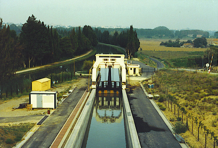 self made